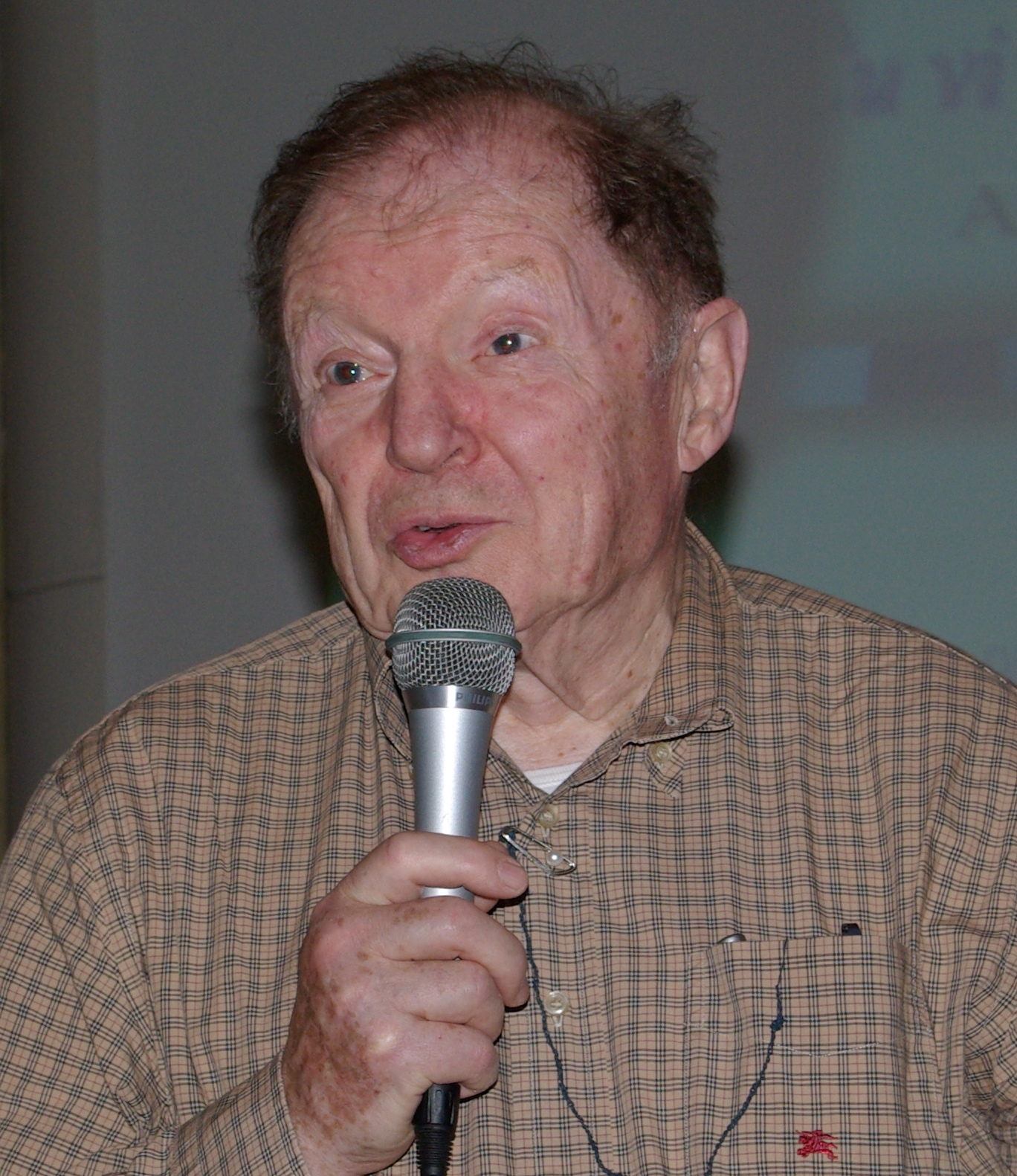 Robert Molimard, tabakologo. Okaze de prelego dum la kongreso de SAT-Amikaro en Bordeaux-Artigues.